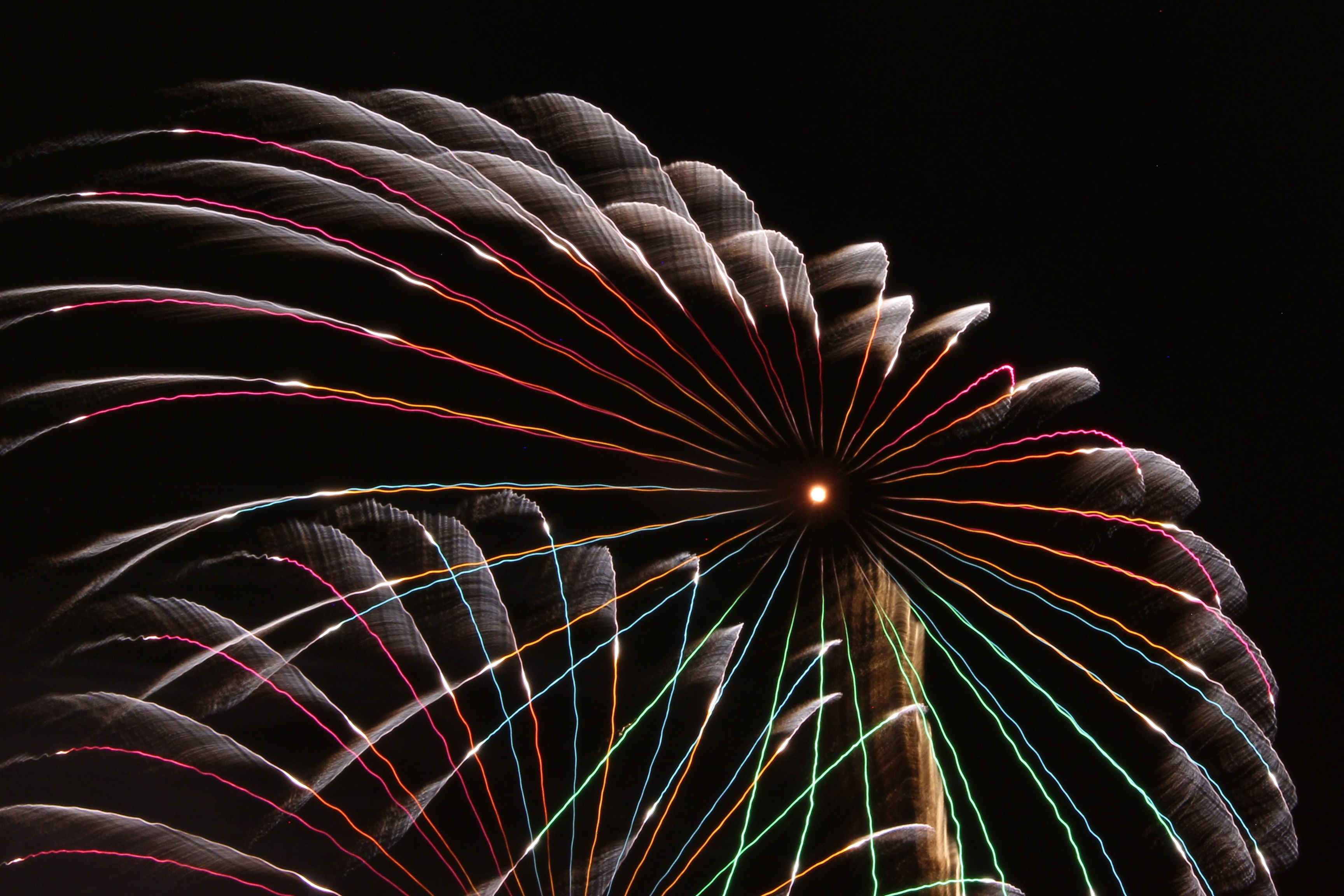 2019年に打ち上げられた花火